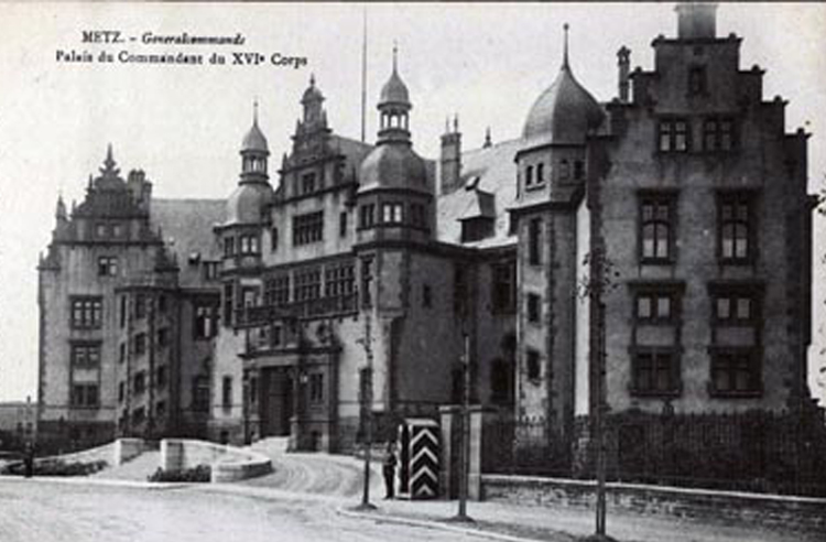 Corpskommando in Metz